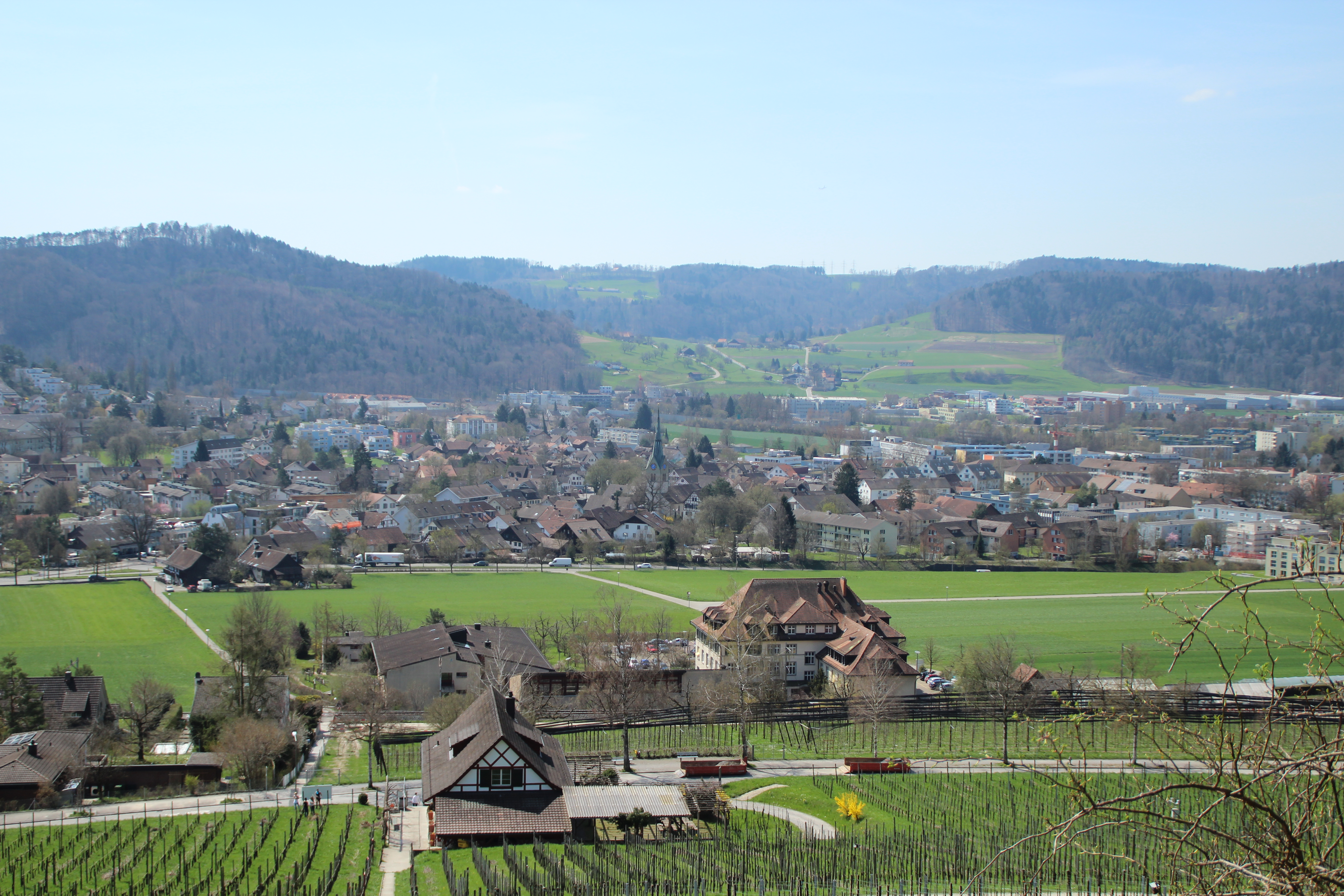 Wülflingen